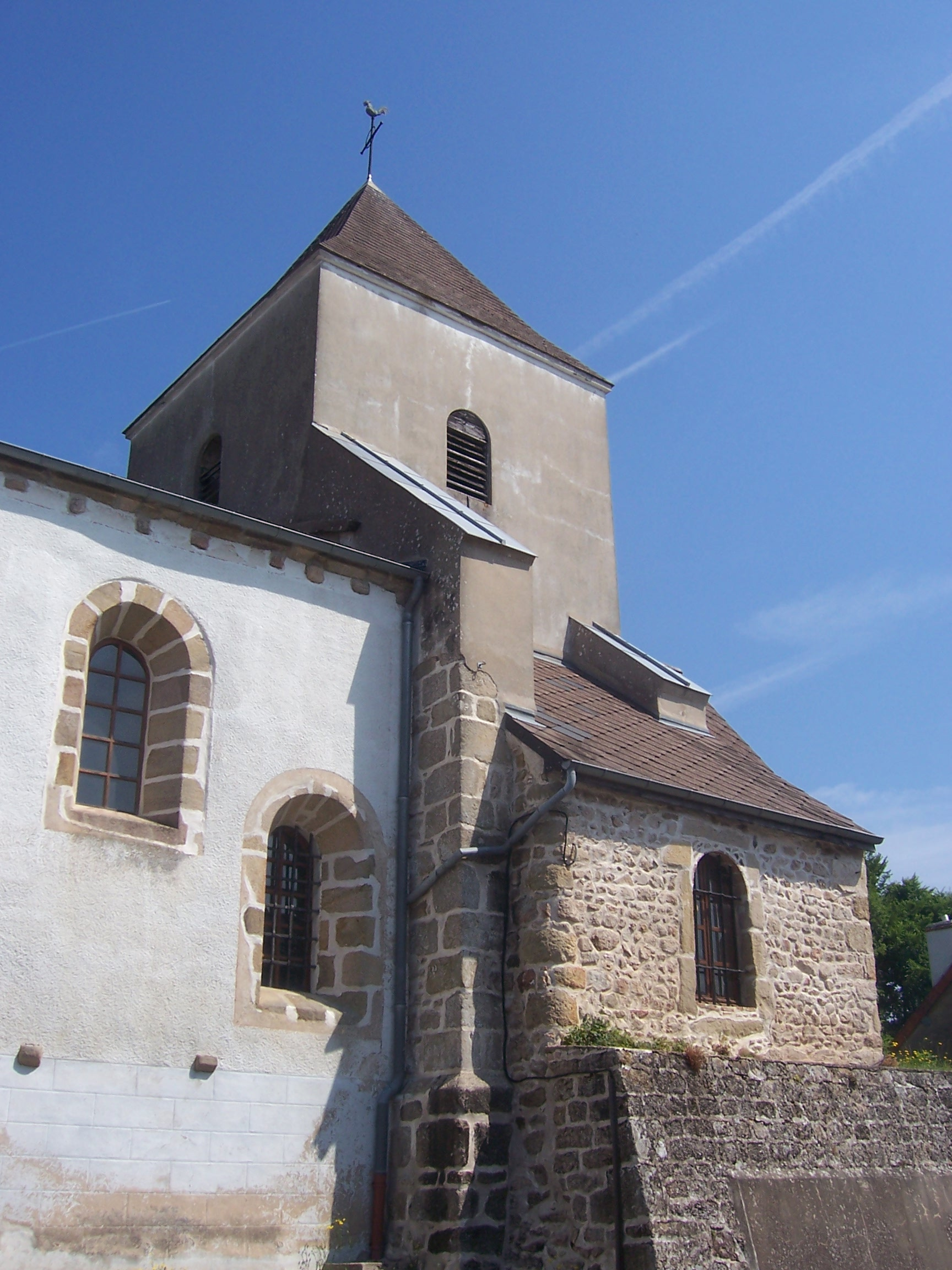 Eglise de Saint-Eugène